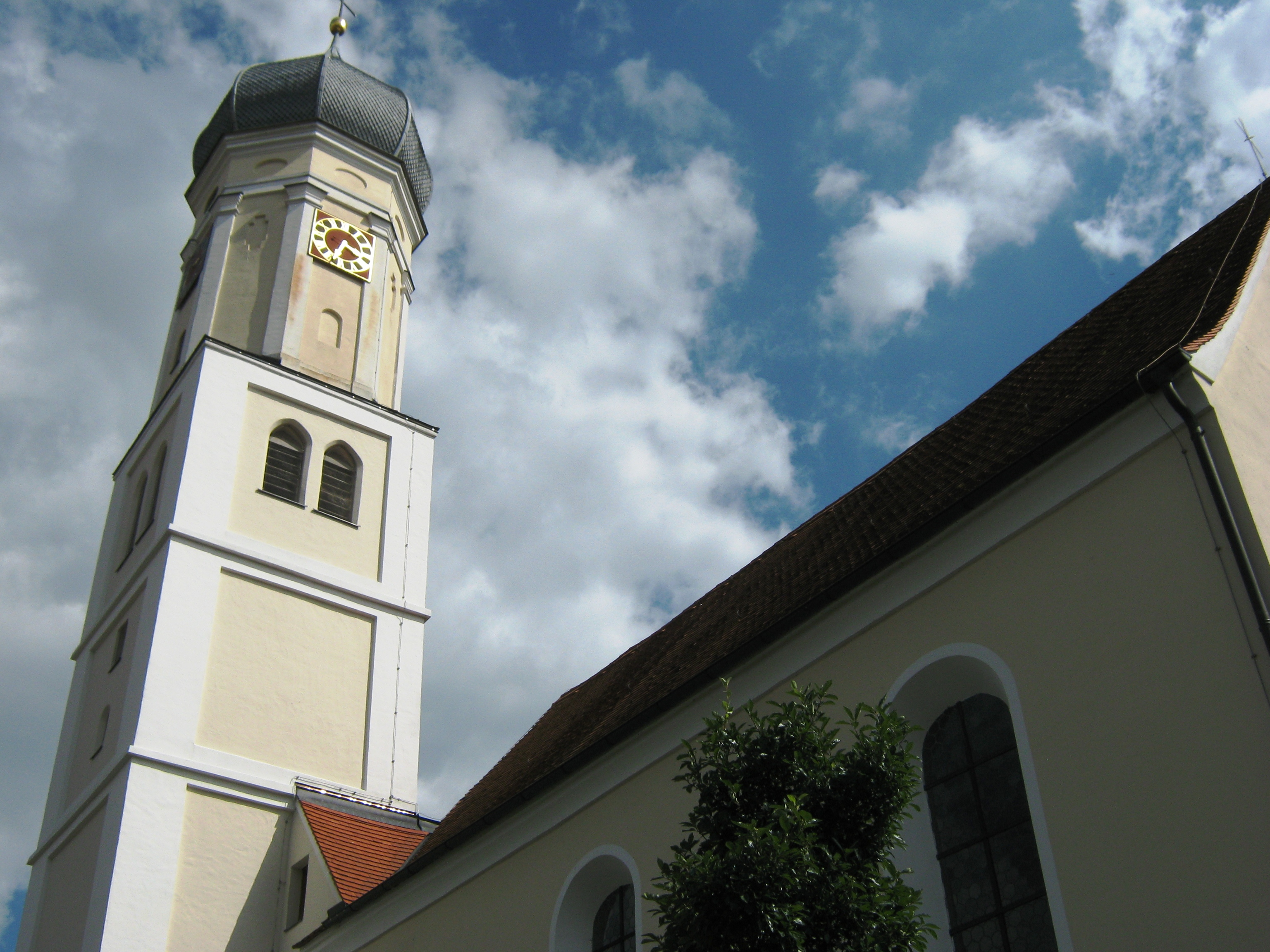 Kirche St. Adeldungdis Anhausen